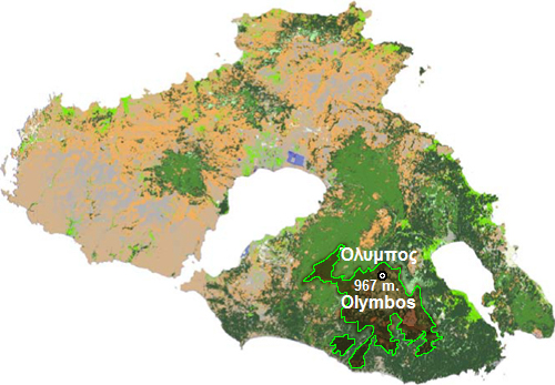 Χάρτης της θέσης του Όρους Ολύμπου.